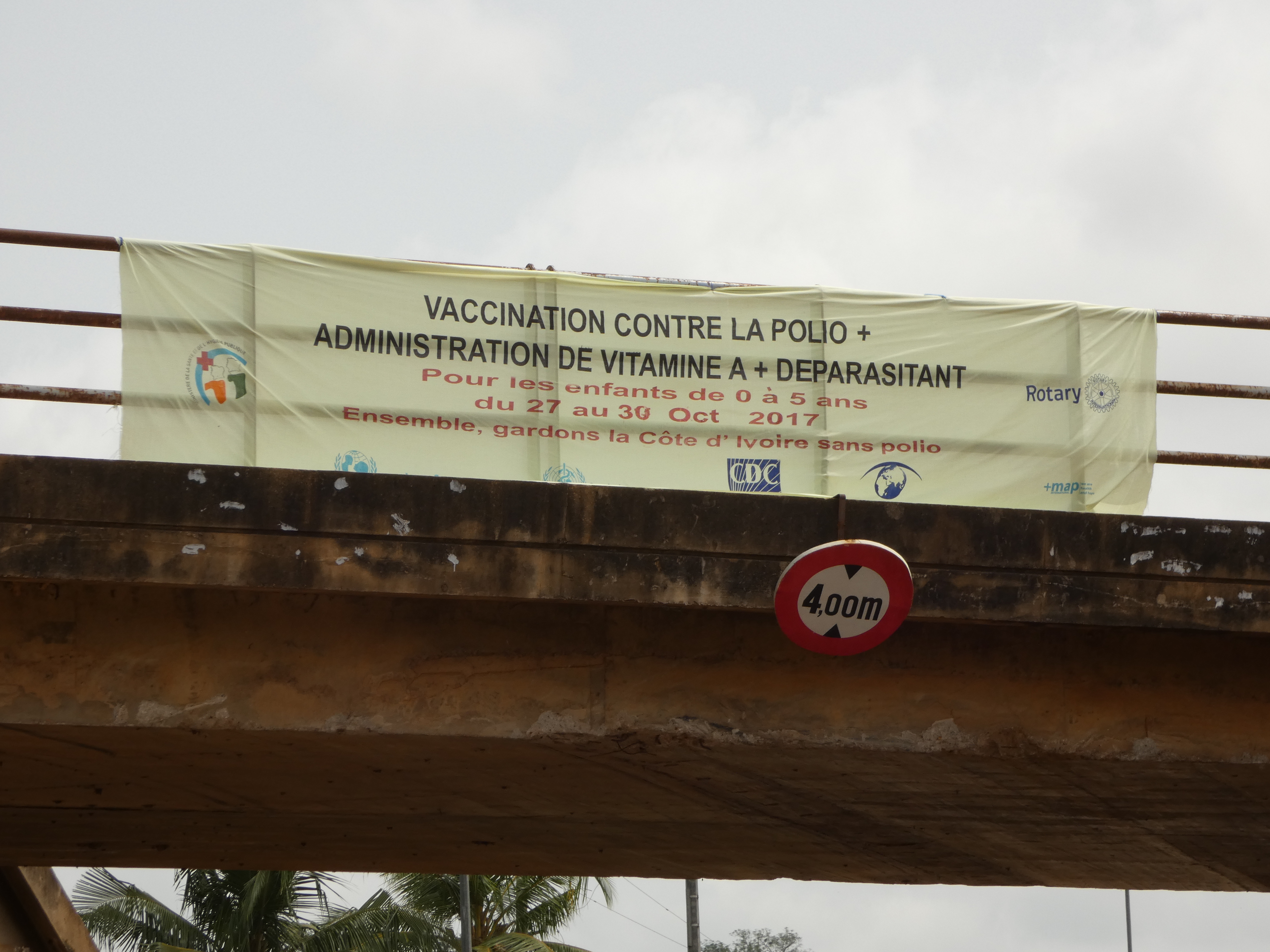 Transparent mit Ankündigung einer Impfkampagne gegen Polio, der Gabe von Vitamin A und Antiparasitika für Kinder zwischen 0 und 5 Jahren im Oktober 2017 in Dimboko, Elfenbeinküste (Côte d’Ivoire)